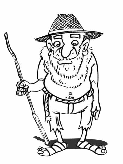 Ermitão. Mito sobre a ancestralidade.